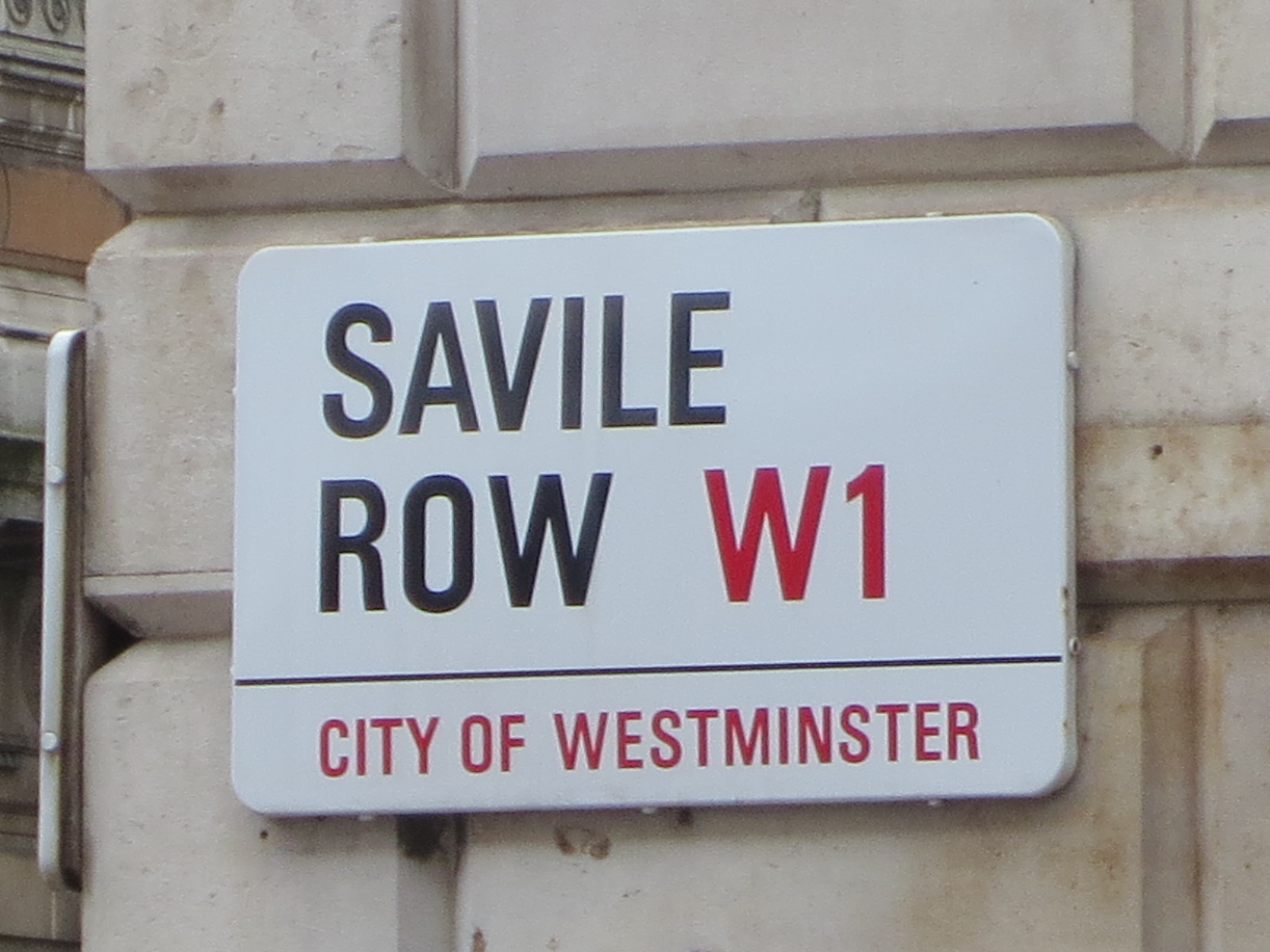 Nom de la rue Saville Row